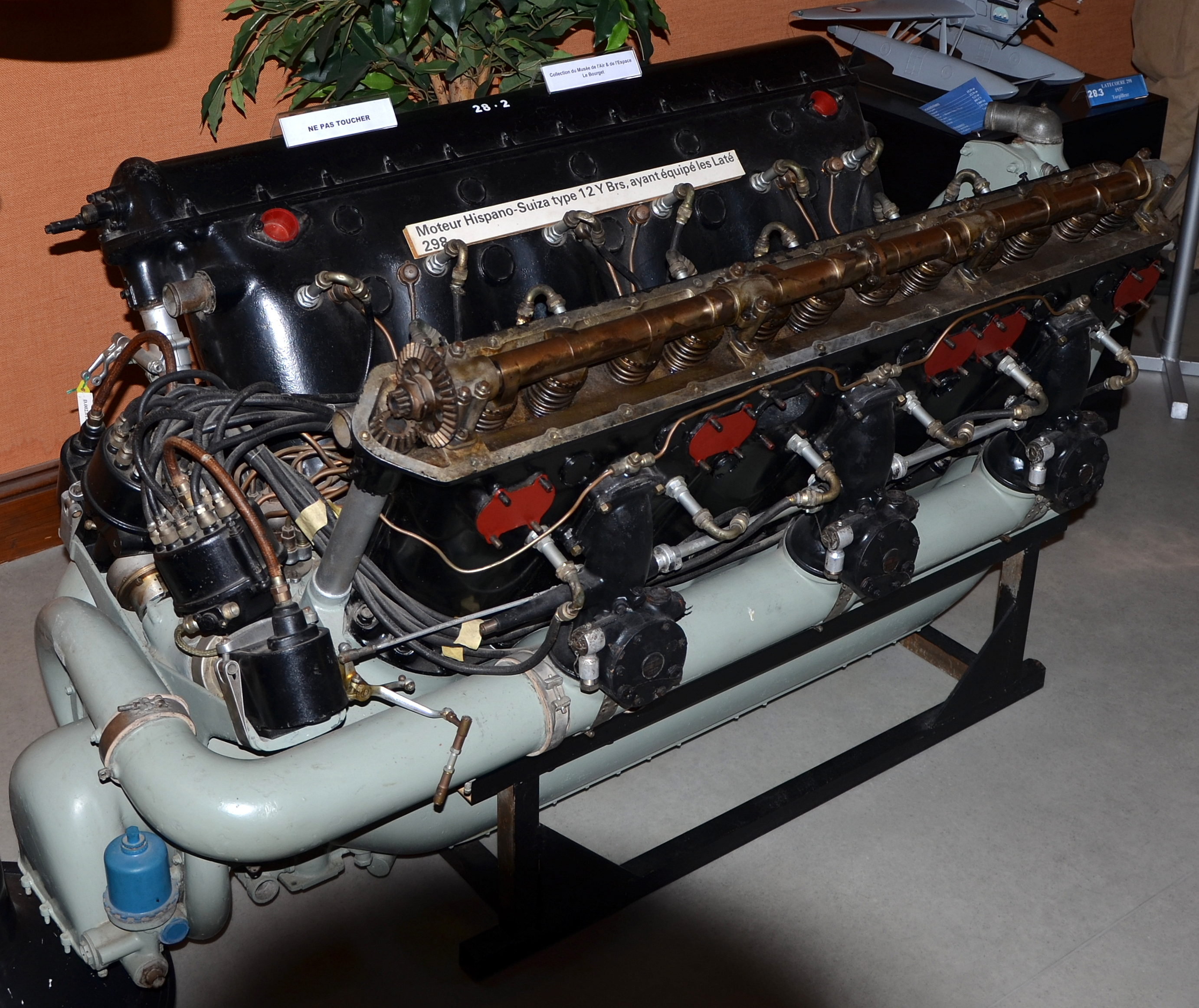 Moteur Hispano-Suiza 12 Ybrs ayant équipé les Latécoère 298, Musée historique de l'hydraviation, Biscarrosse, Landes, France. Pret du musée de l'Air